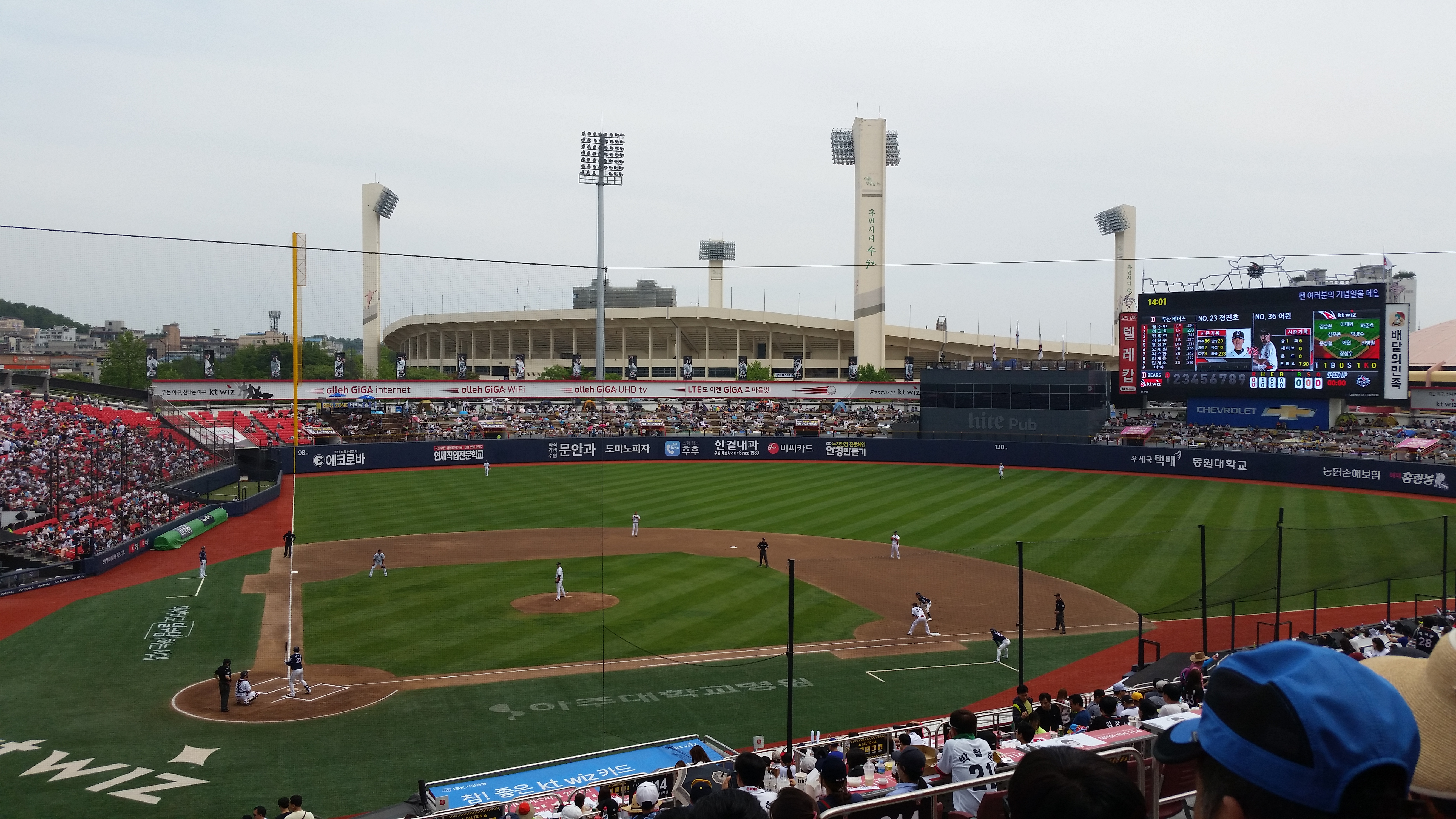 수원 KT 위즈 파크